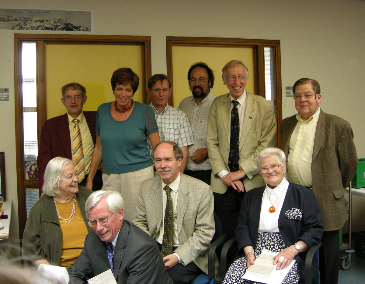 Een aantal Nederlanders naar wie een planetoïde vernoemd is. Zittend, van links naar rechts; schrijfster Hella Haasse (10250 Hellahaasse), IAU-secretaris dr. Karel van der Hucht (10966 van der Hucht), Nobelprijswinnaar prof.dr. Gerard 't Hooft (9491 Thooft), planetoïdenontdekster dr. Ingrid van Houten-Groeneveld (1674 Groeneveld). Staand, van links naar rechts; voormalig directeur van Stichting 'De Koepel' Mat Drummen (9705 Drummen), voormalig Hoofd Public Relations van ESA Heidi Graf (10252 Heidigraf), meteorenwaarnemer Urijan Poerink (10982 Poerink), wetenschapsjournalist en hoofdredacteur van Kennislink Carl Koppeschaar (7973 Koppeschaar), sterrenkundige prof.dr. Ed van den Heuvel (3091 van den Heuvel), historische telescopen-specialist Peter Louwman (9697 Louwman).